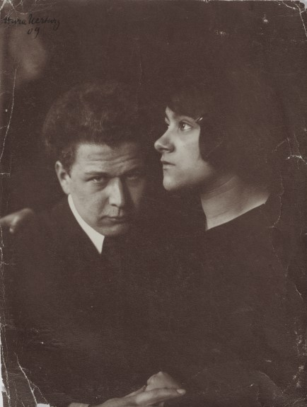 Kurt Kroner und seine Frau Ella Kroner, geborene Behrend, Berlin 1909